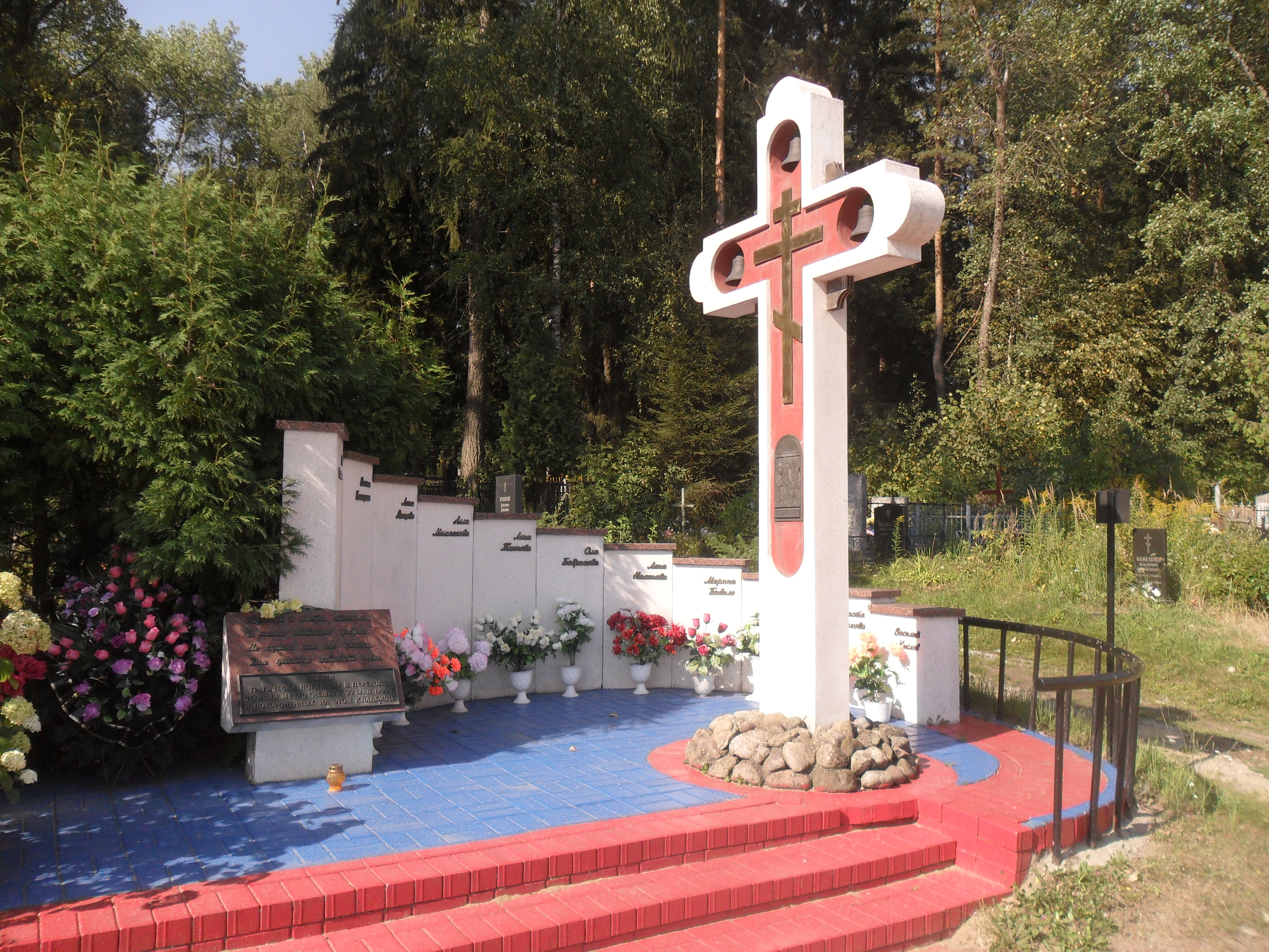 Мемориал погибшим в давке на Немиге, похороненным на Восточном кладбище Минска.